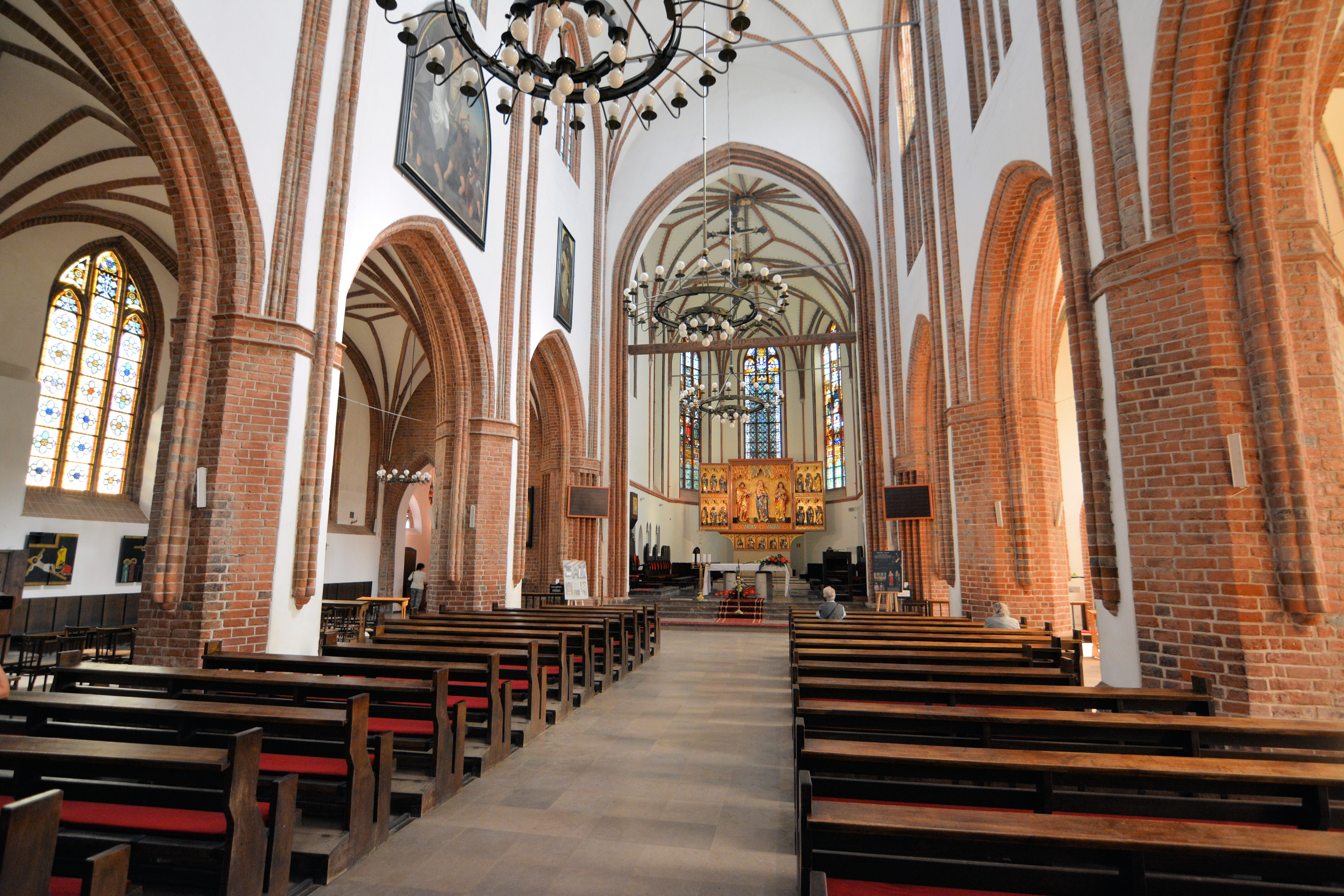 Koszalin, Katedra p.w. Niepokalanego Poczęcia NMP, 1300-1333